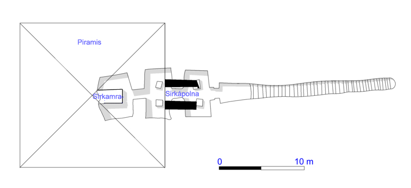 Meroéi piramis rajza